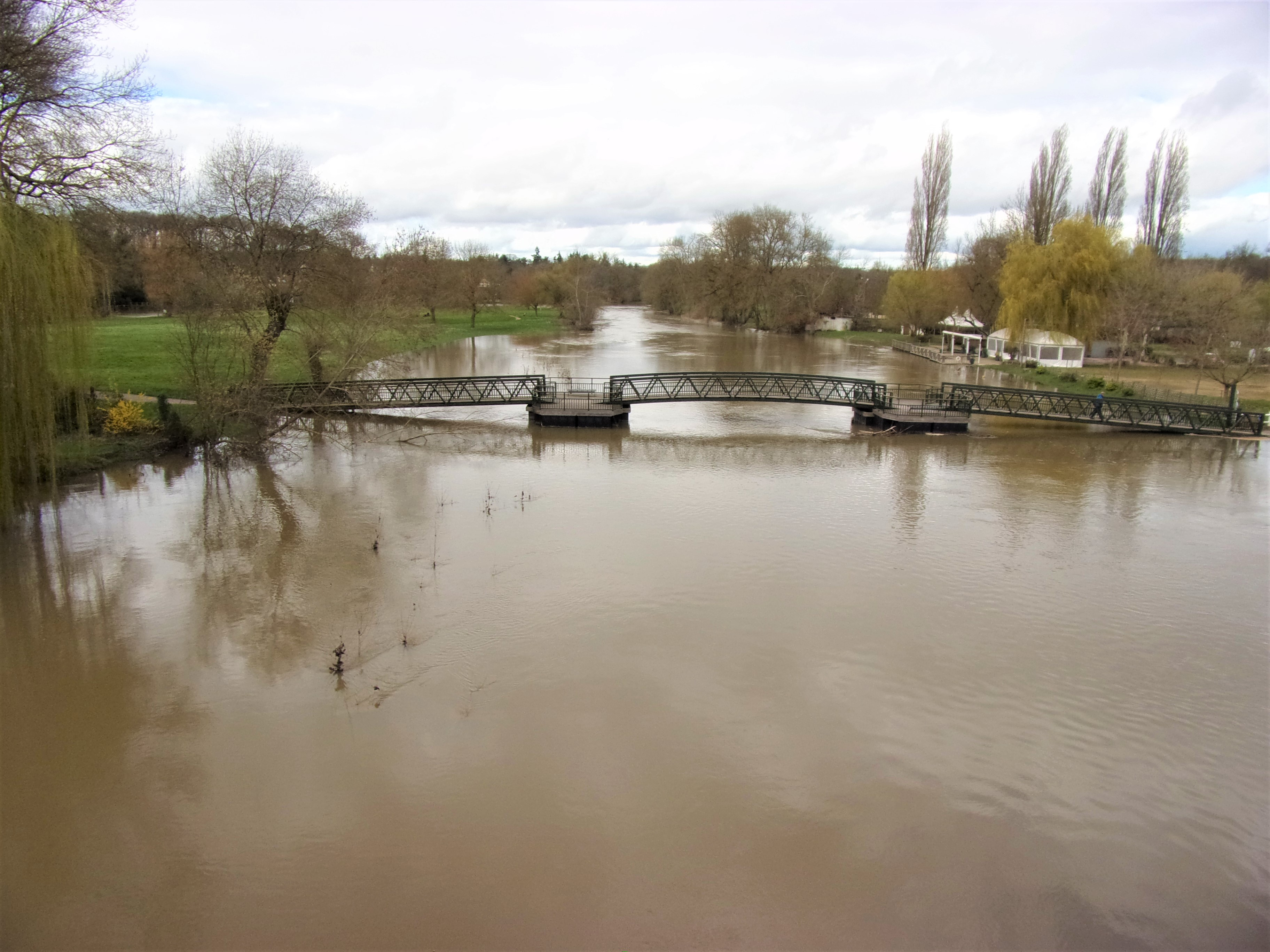 L'Indre en crue à Montbazon